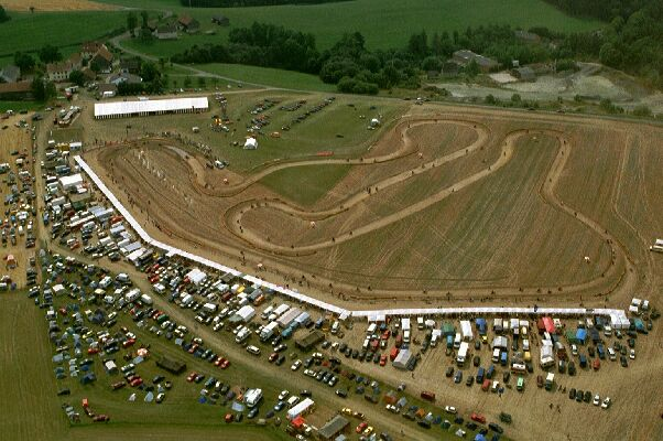 Luftbild des Mofarennens in Speinshart 2001